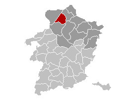 Lec'hiañ Lommel, Belgia.